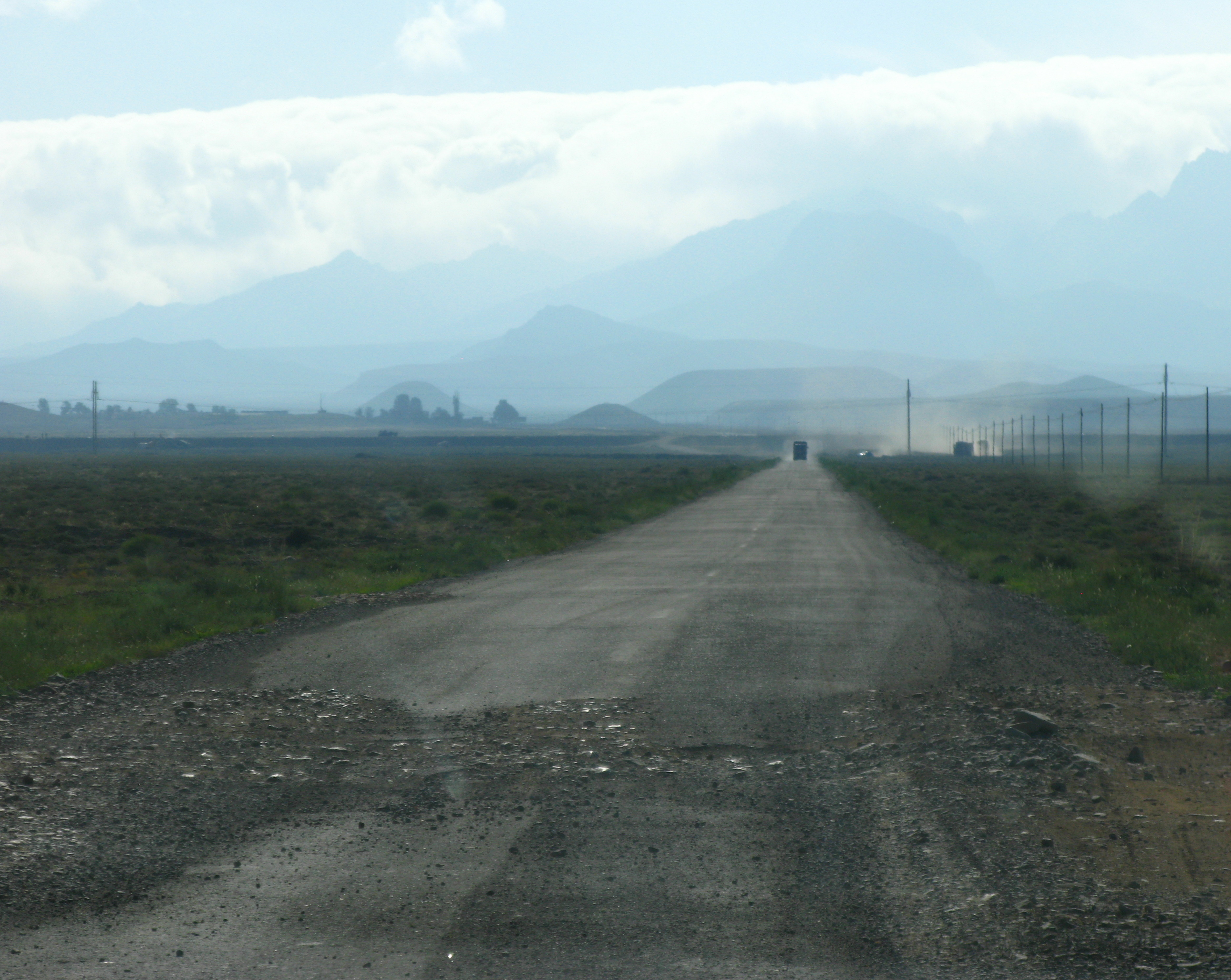 Side-street in Inner Mongolia